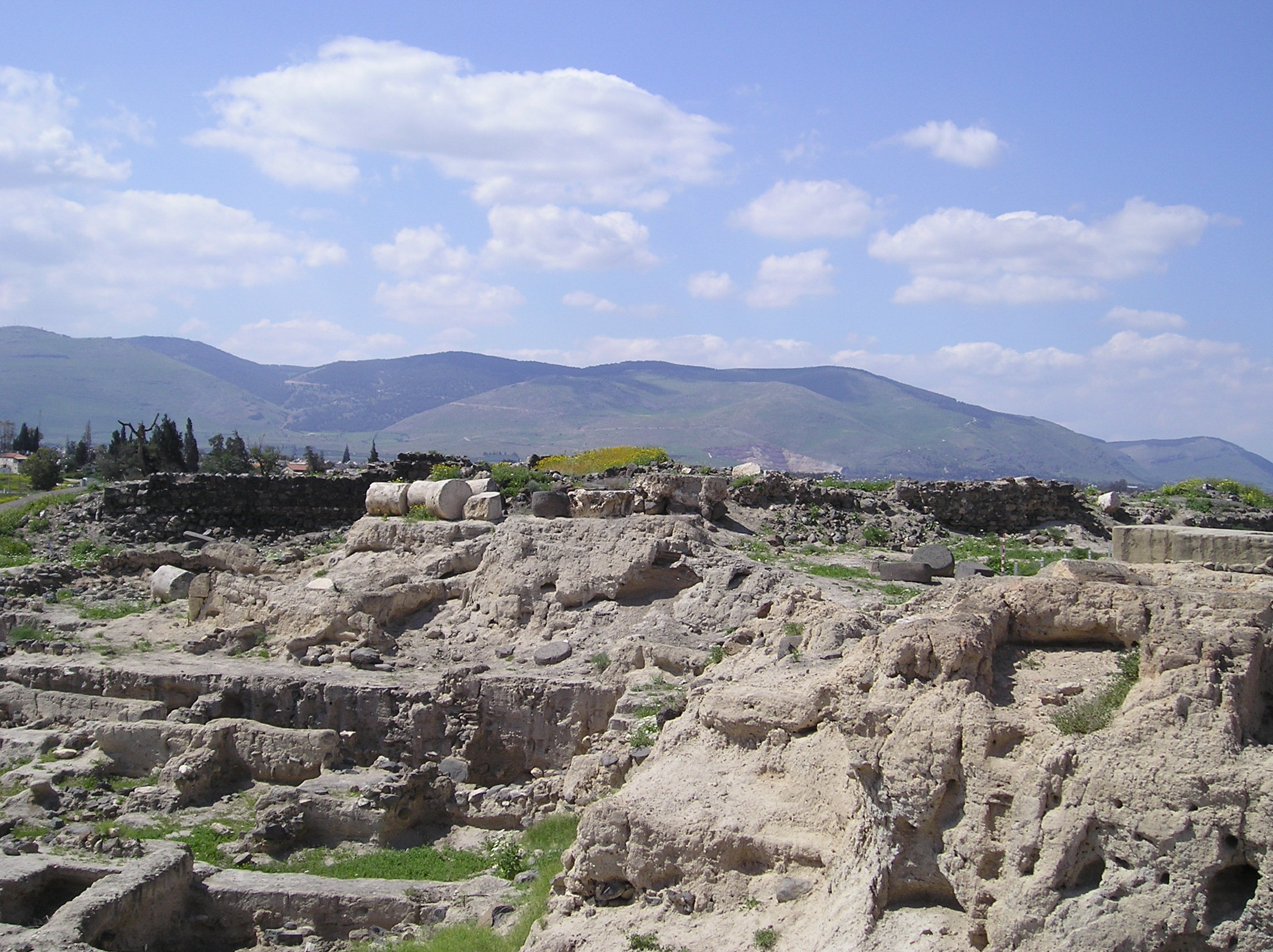 Bet Szean (stanowisko archeologiczne - Scytopolis) w Izraelu. Kananejskie Bet Szean na szczycie Tell El-Husn.